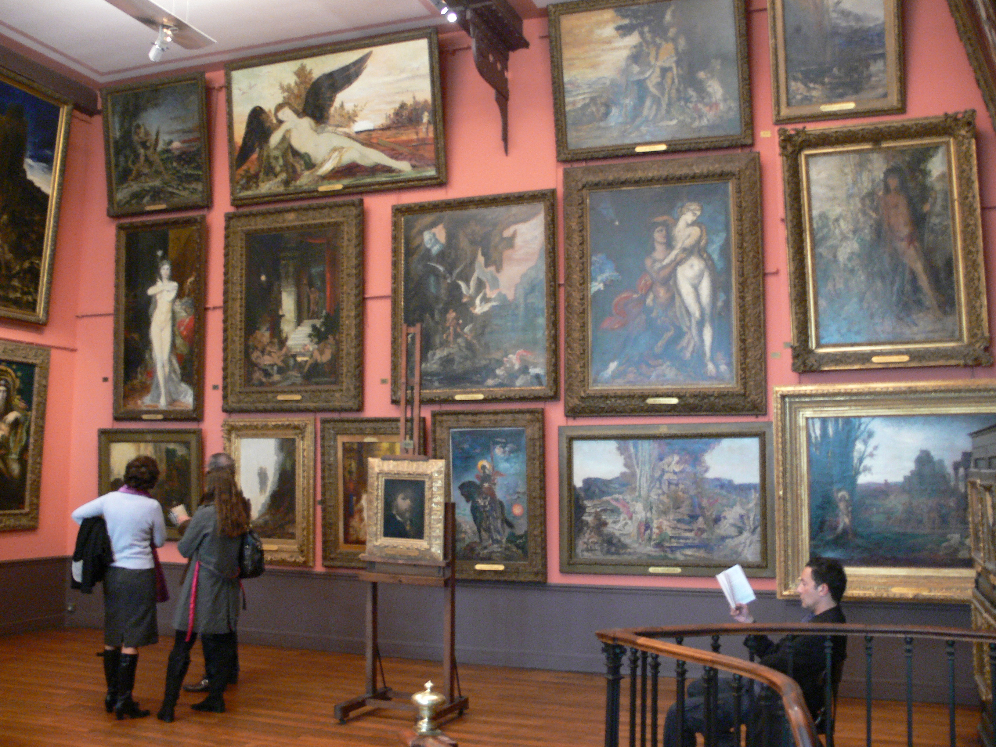 Musée national Gustave-Moreau, Paris